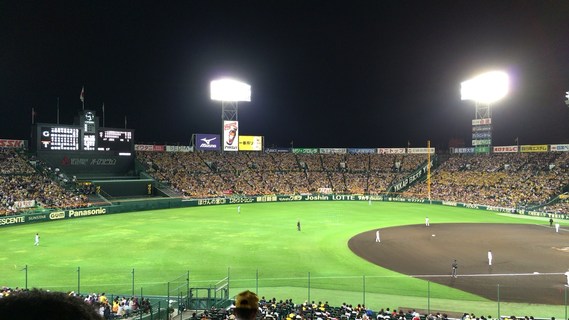 甲子園でのナイトゲーム